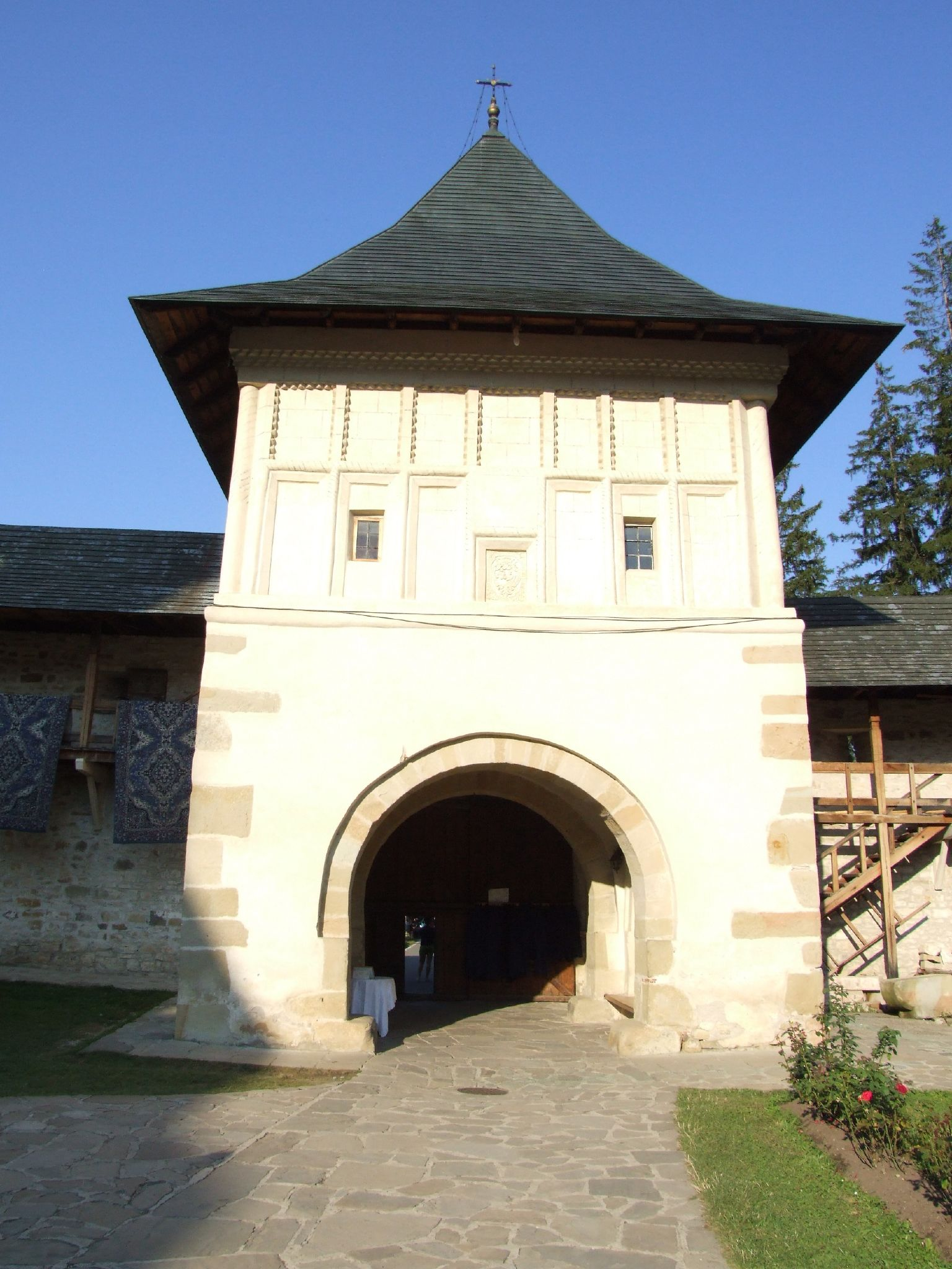 Putna -16.08.2007